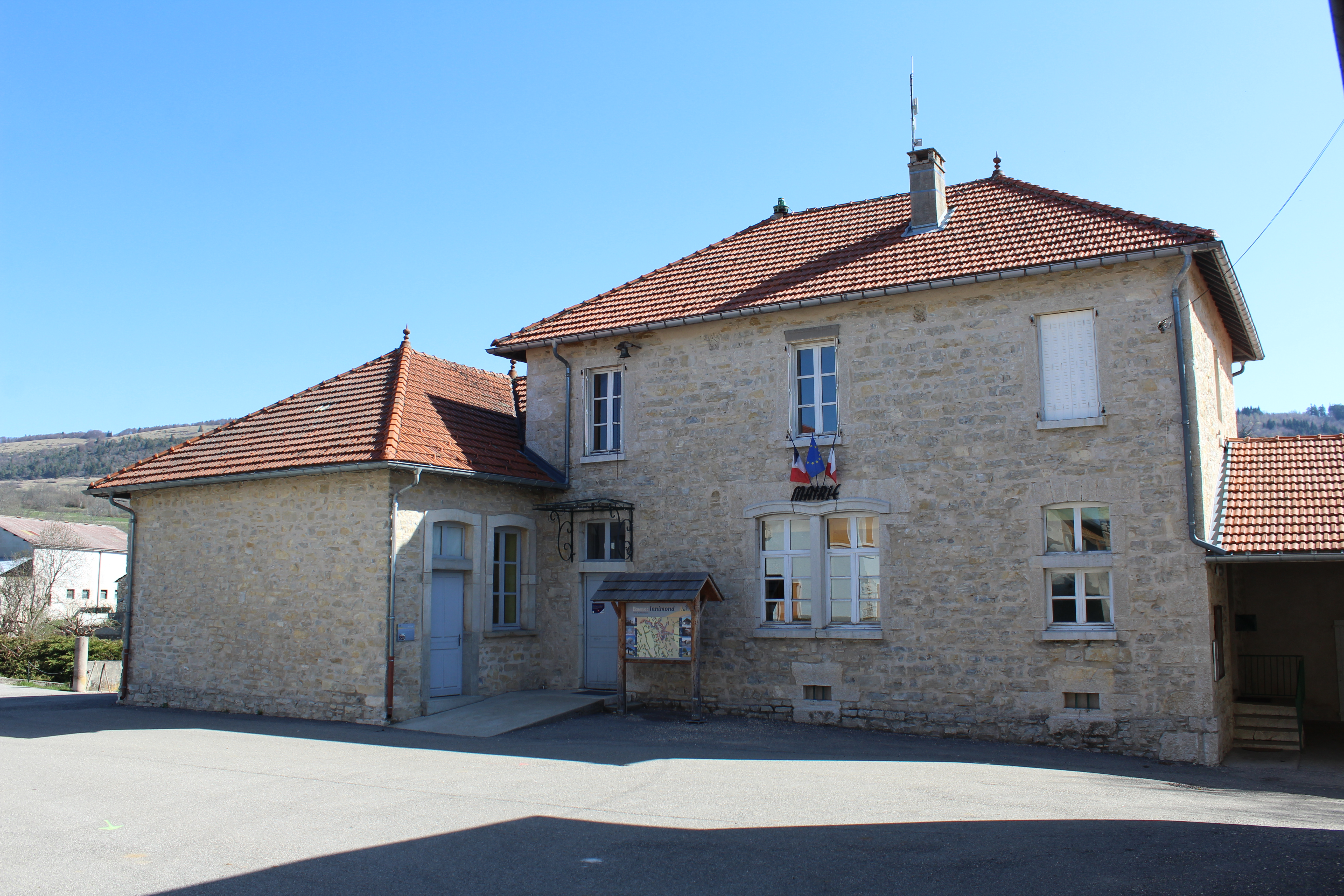 Mairie d'Innimont.